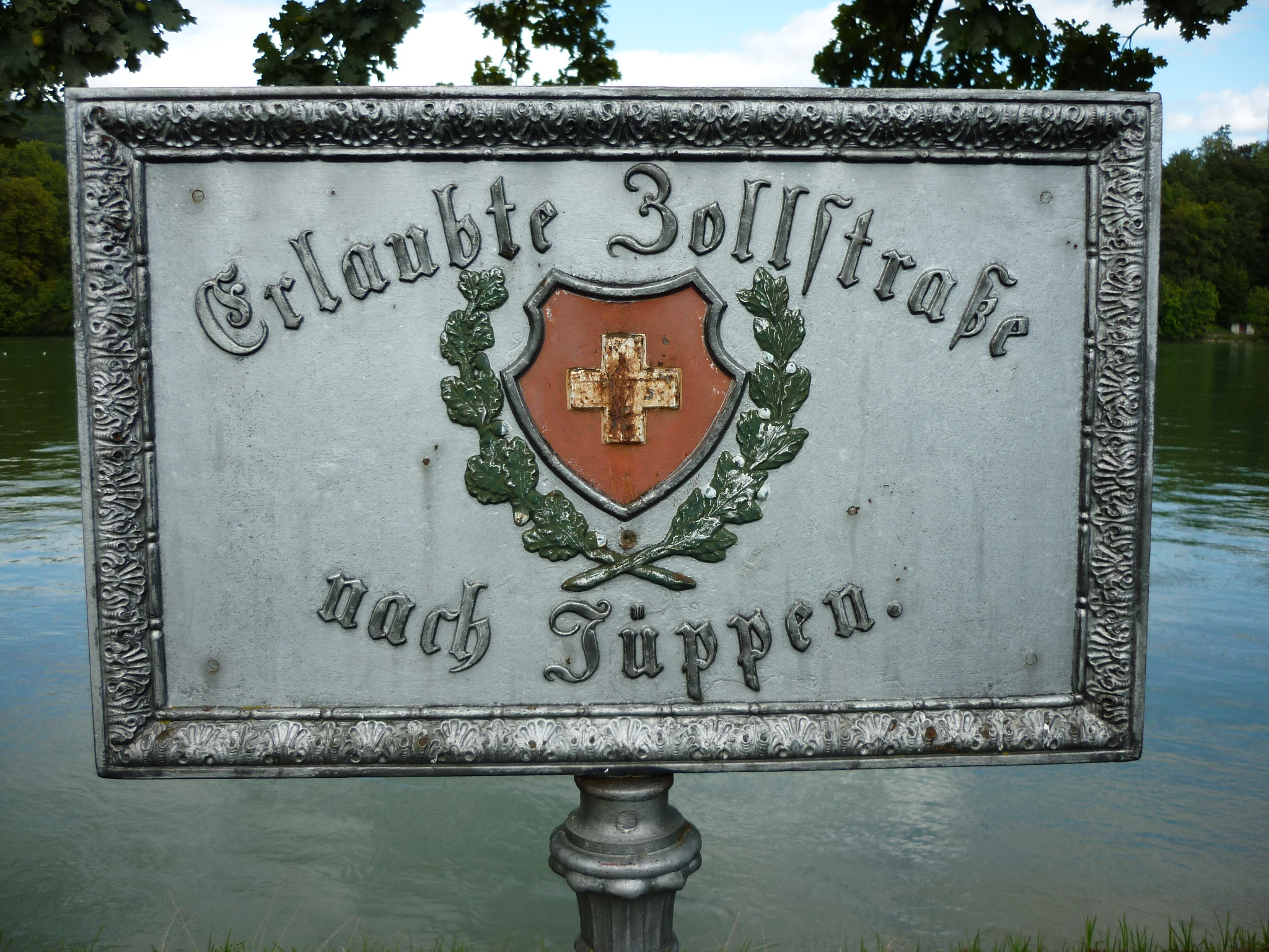 Erlaubte Zollstrasse nach Jüppen, Full AG, Schweiz